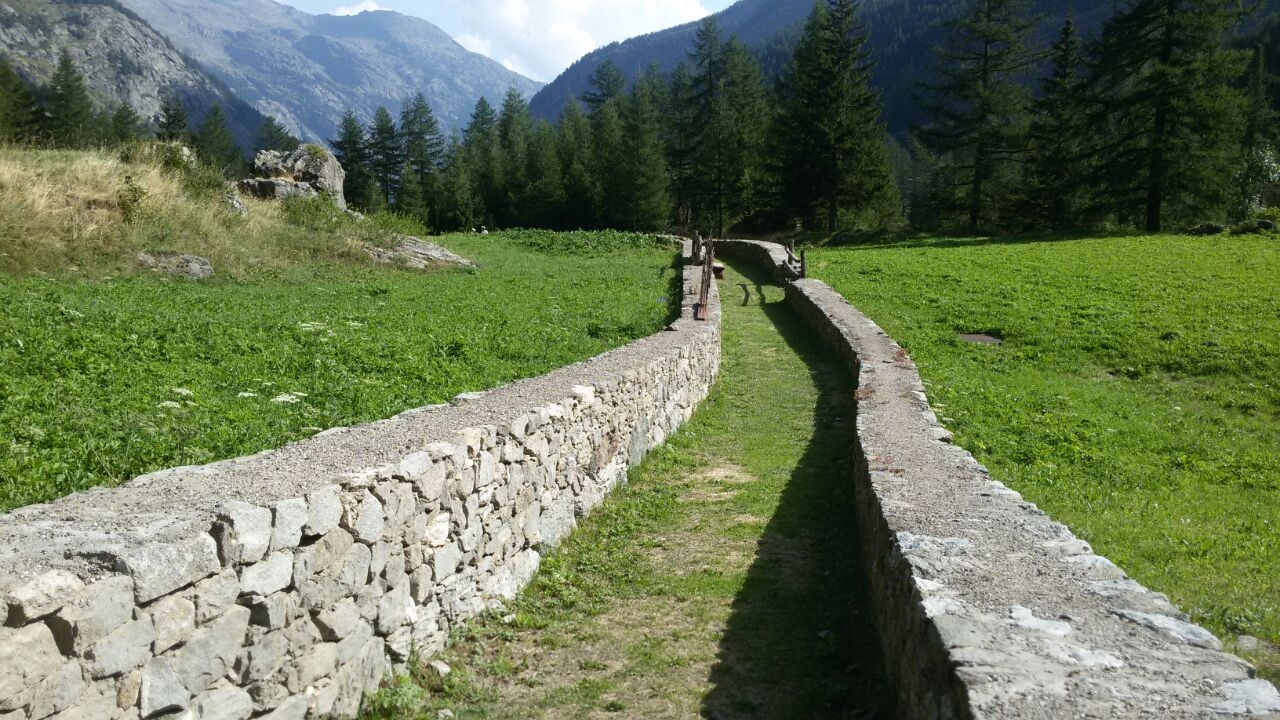 Valgrisenche